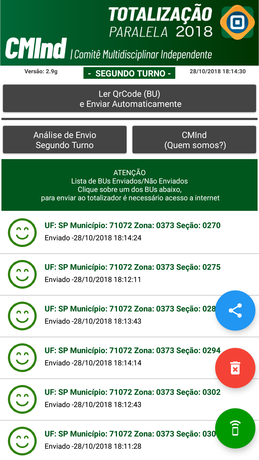 Aplicativo Totalização Paralela em funcionamento REAL no dia do 2º turno das eleições 2018.